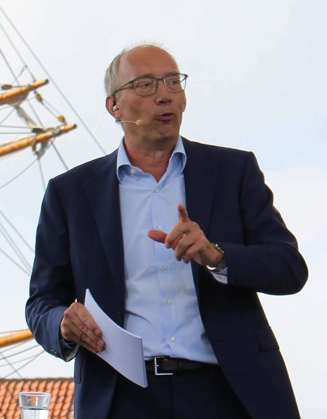 Debat med Niels Krause-Kjær, Folkemødet 2016.